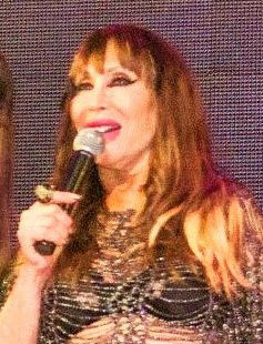 Moria Casán en mayo del 2015.